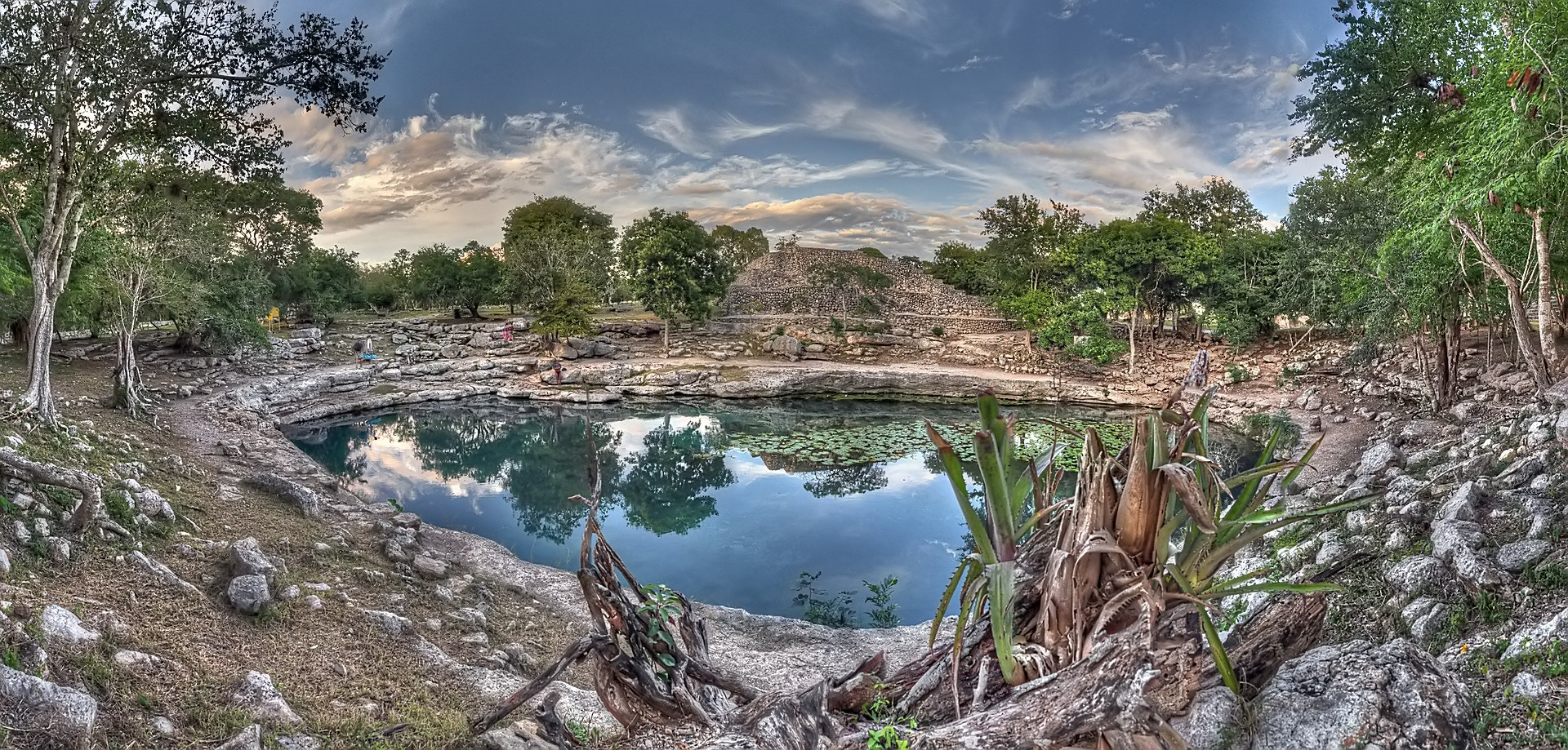 Dzibichaltún, El Cenote